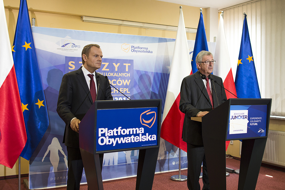 EPP Poznań - Szczyt regionalnych przywódców EPL